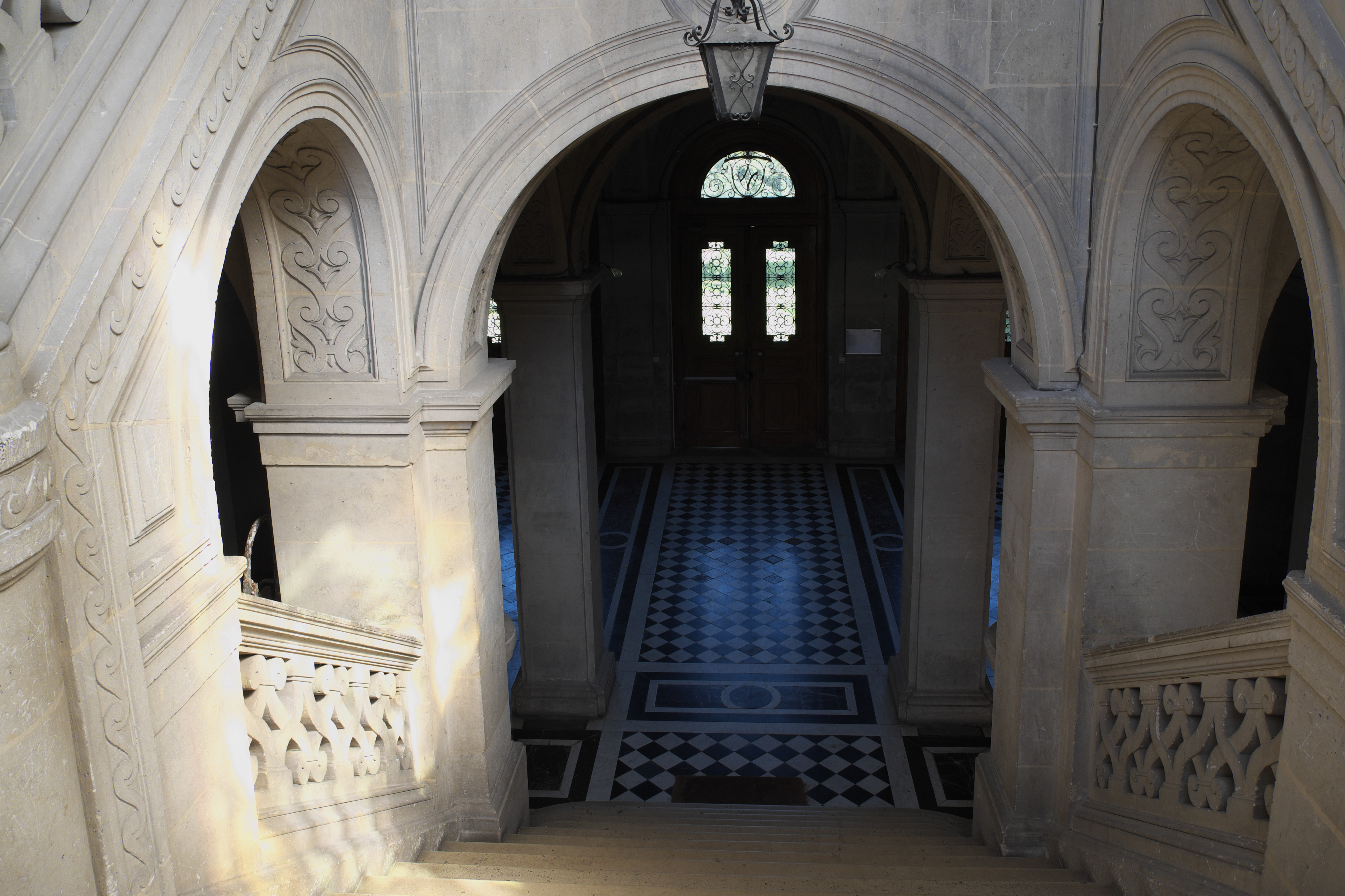 Schloss in Compans im Département Seine-et-Marne (Île-de-France/Frankreich), Treppenhaus